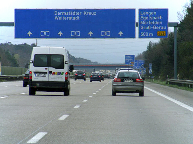 Bundesautobahn 5 Ausfahrt Langen / Mörfelden